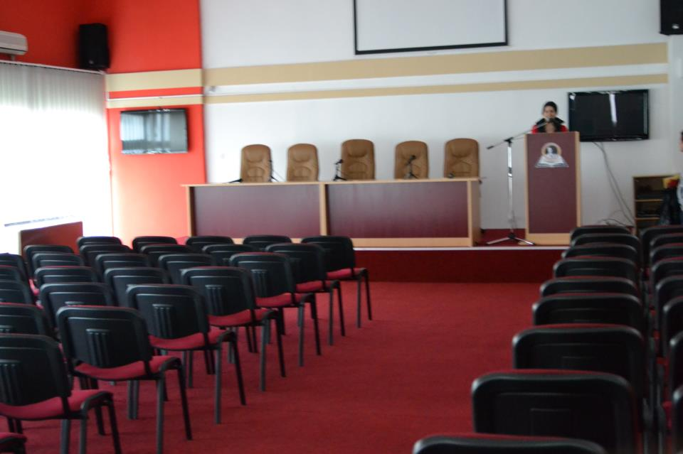 Билбиотека